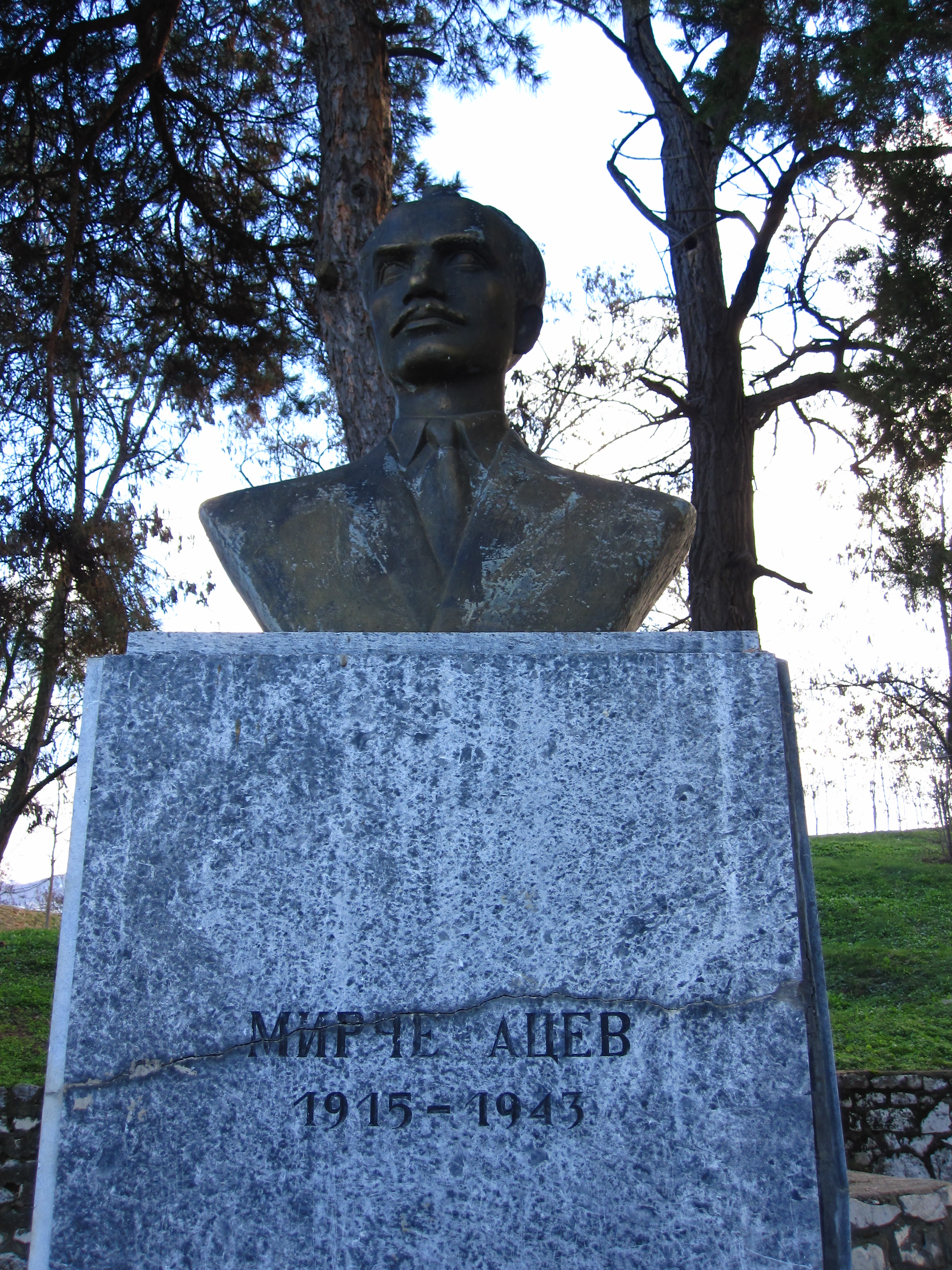 Биста - Мирче Ацев - Прилеп